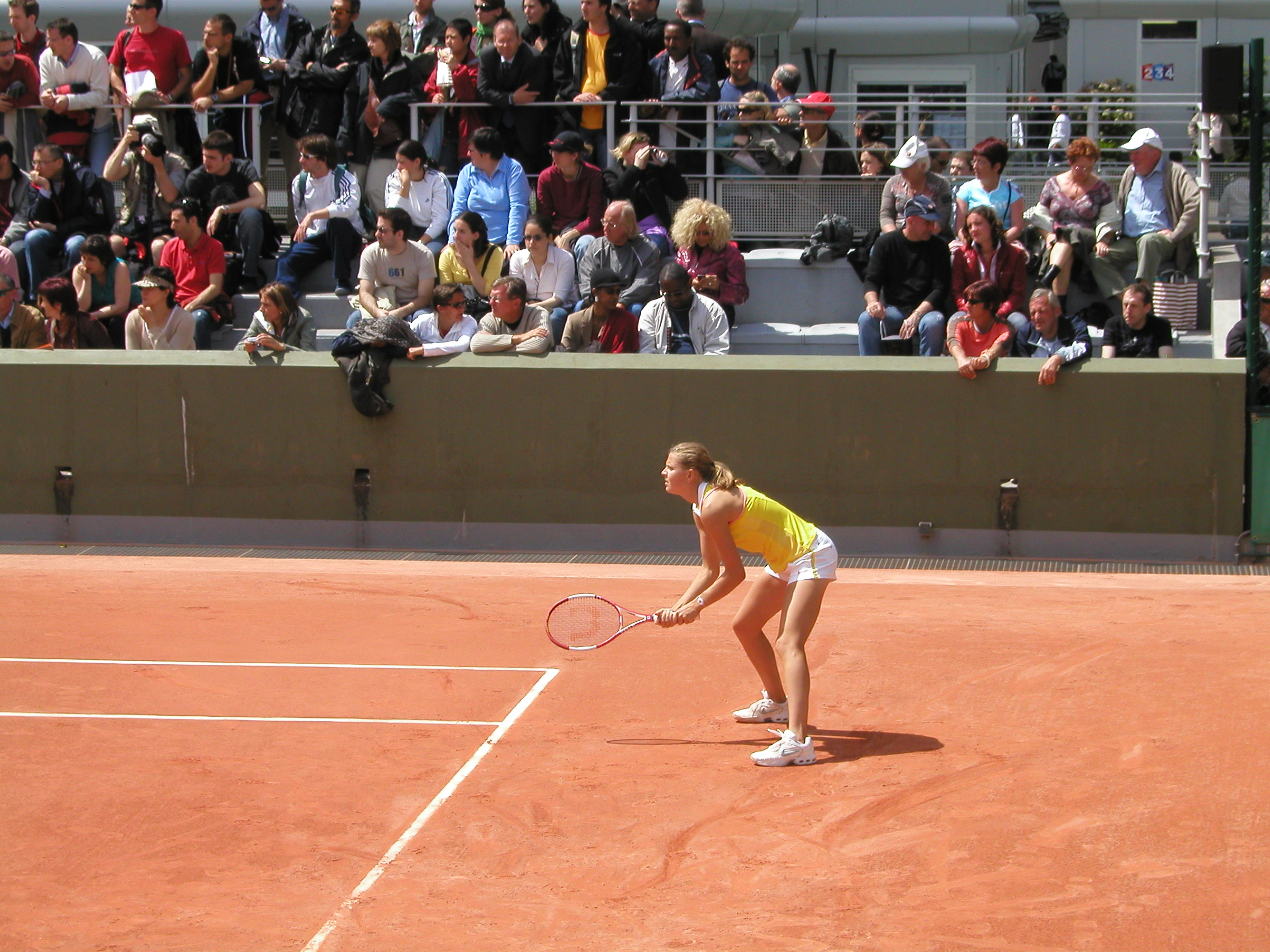 Anda Perianu